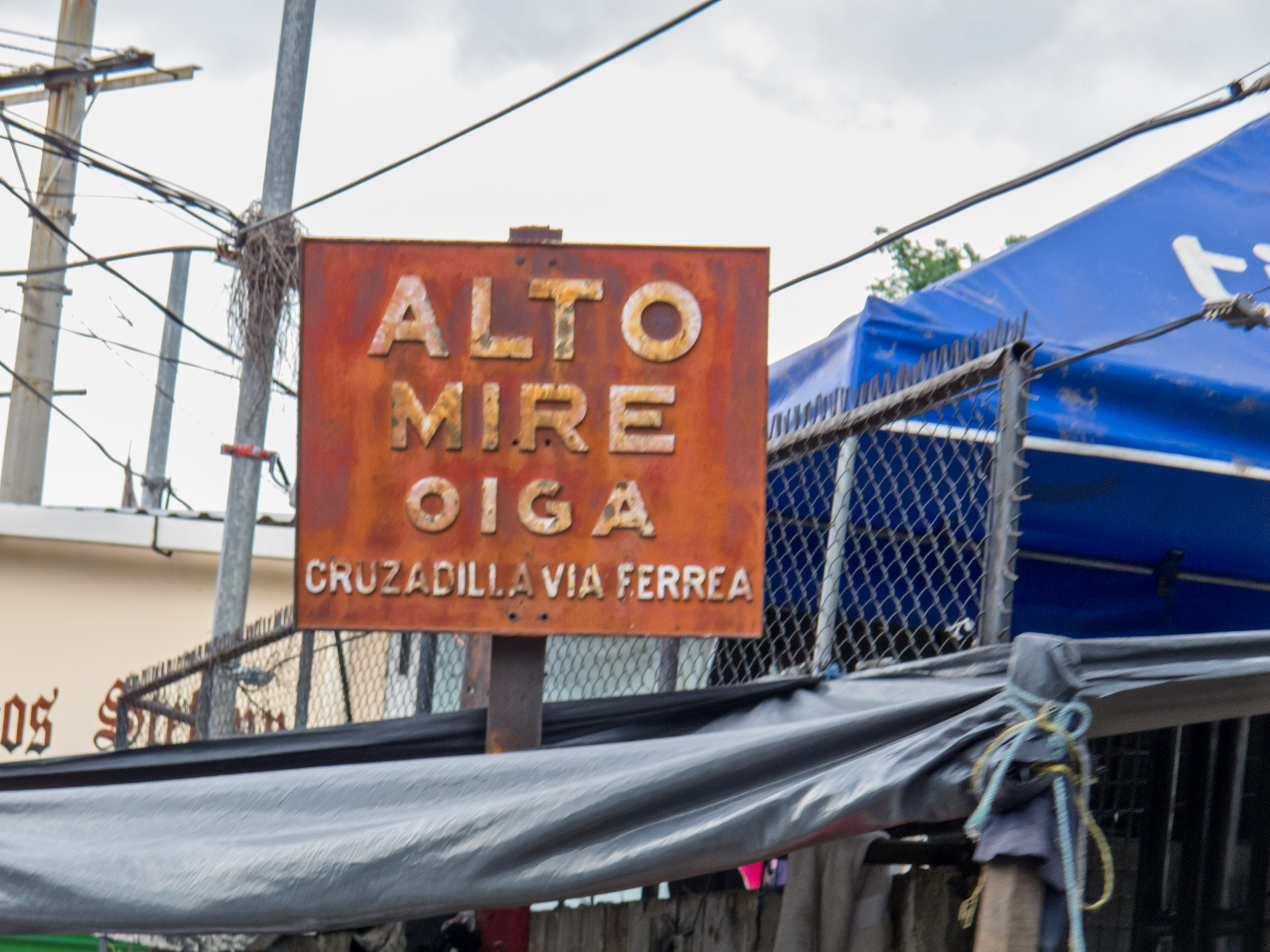 Rótulo marcando la cruce de la via ferrea (FENEDESAL) en Ilopango, El Salvador